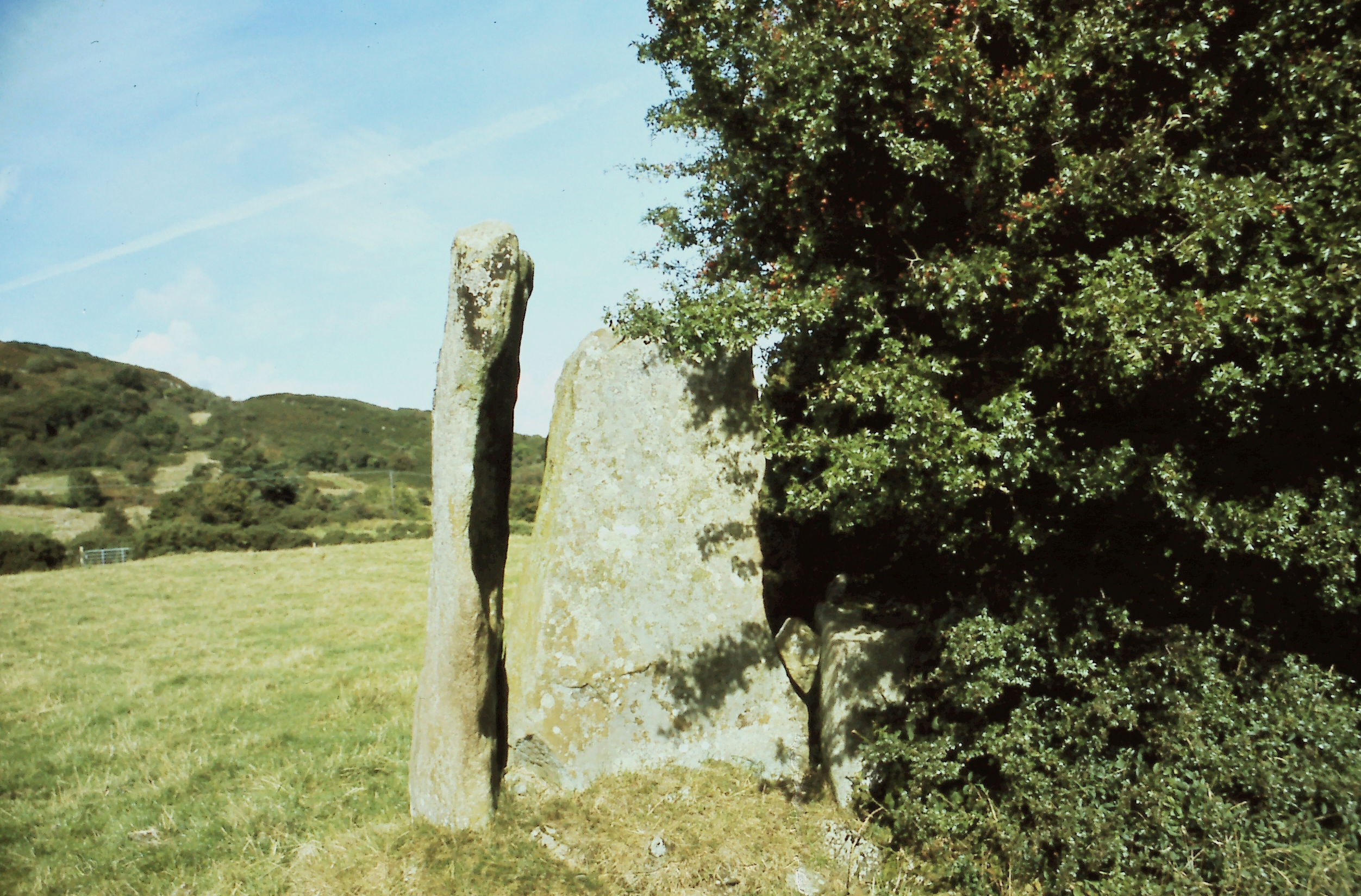 Aghmakane Portal Tomb